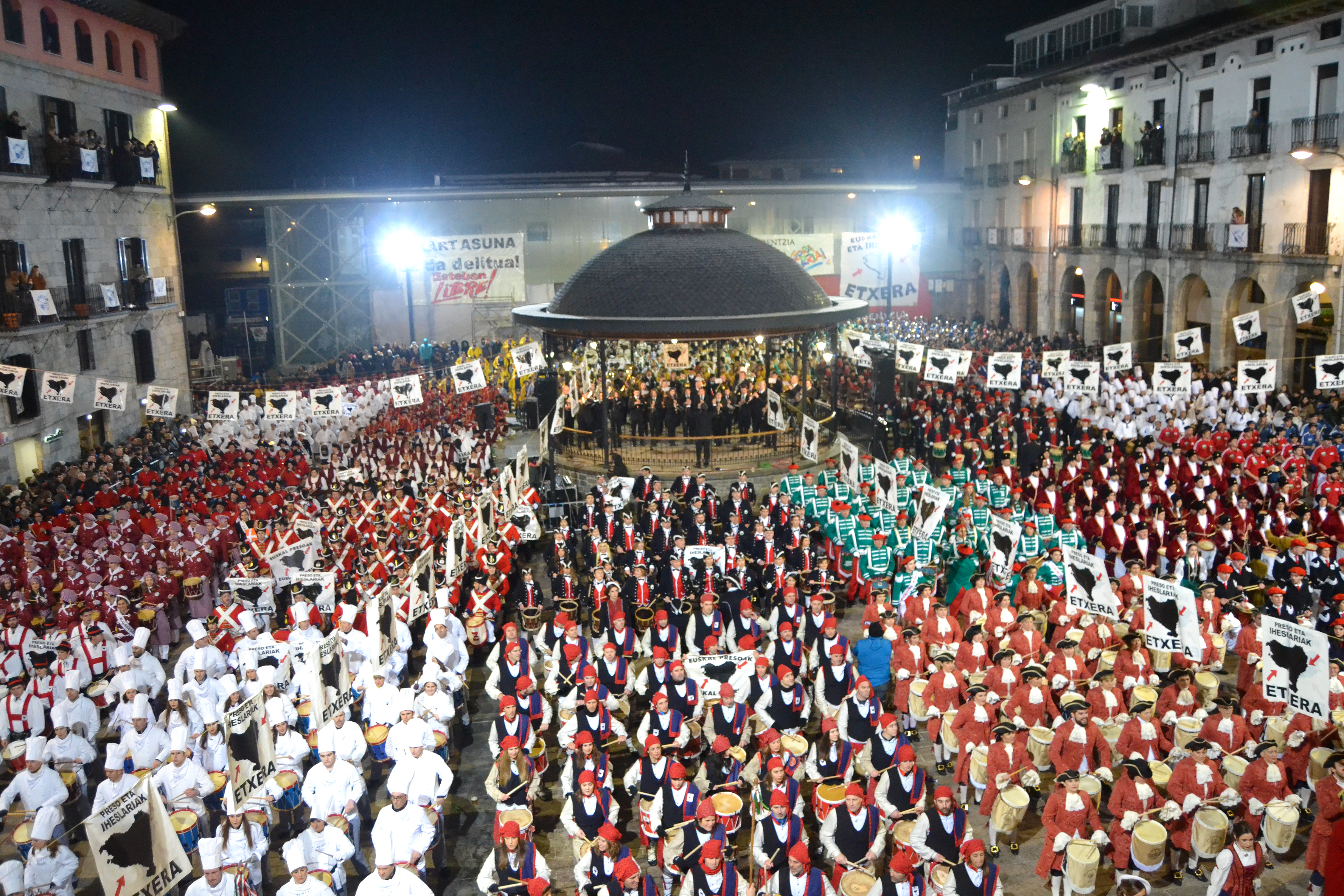 2017ko Azpeitiko helduen danborrada